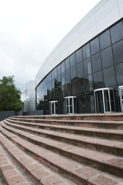 Centro Estudiantil Luis Elizondo, Tecnológico de Monterrey, 64849, Monterrey, NL, Mexico